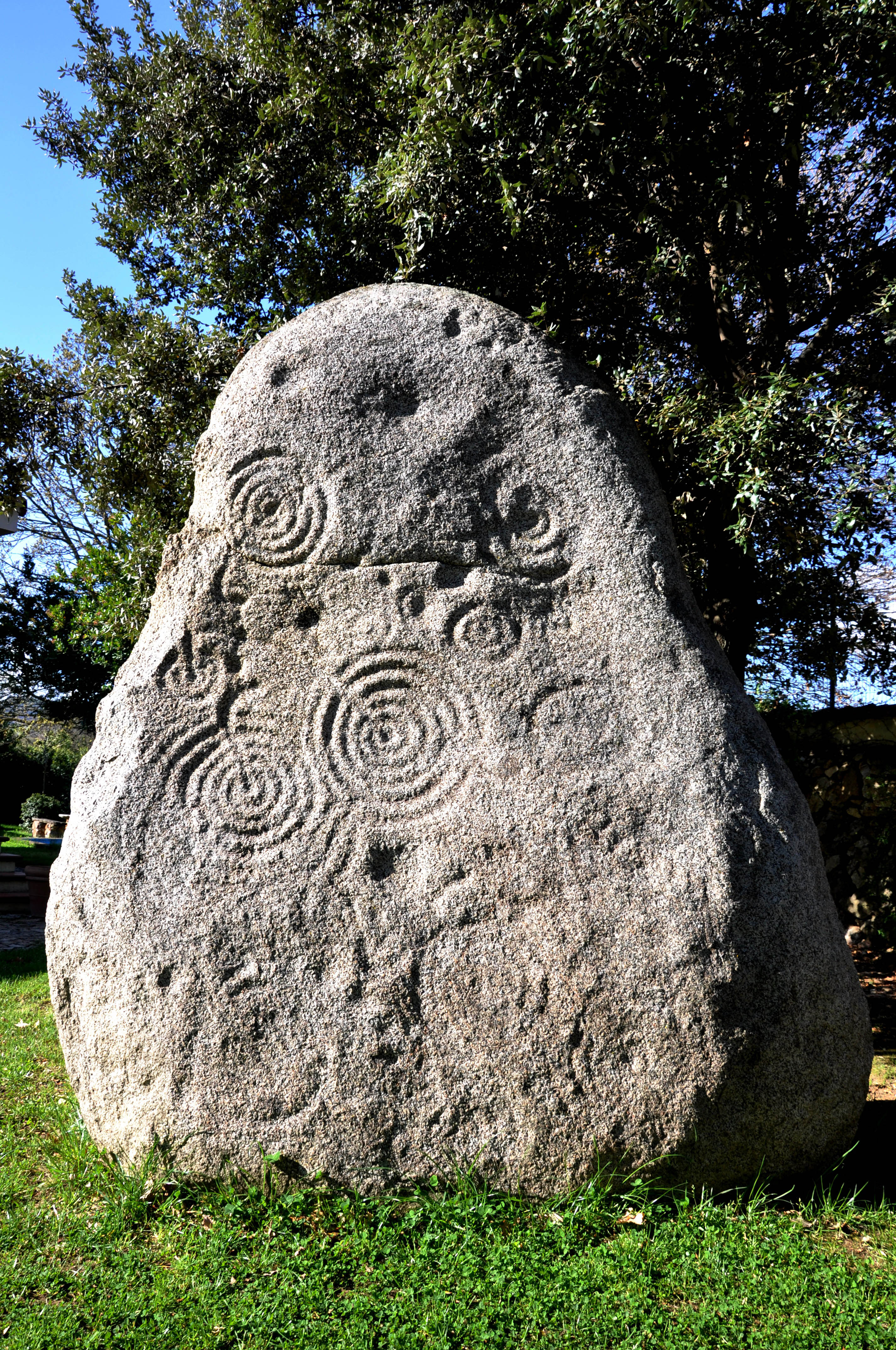 Lastra di Boeli, impropriamente chiamata Stele di Boeli, detta Perda Pintà. - Foto R. Ballore